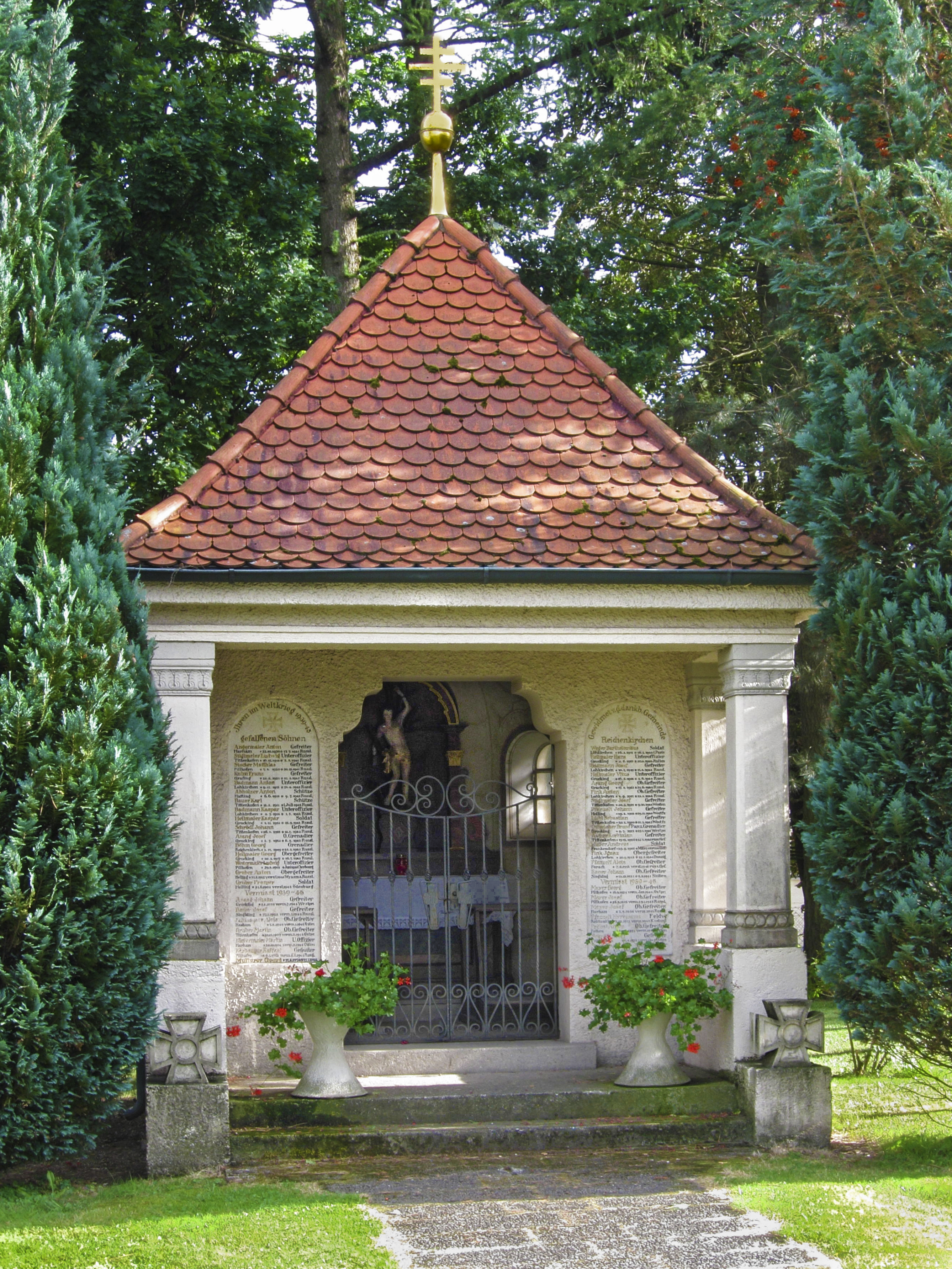 Reichenkirchen; Kriegergedächtniskapelle in Form eines kleinen Tempels, 1923; mit Ausstattung.